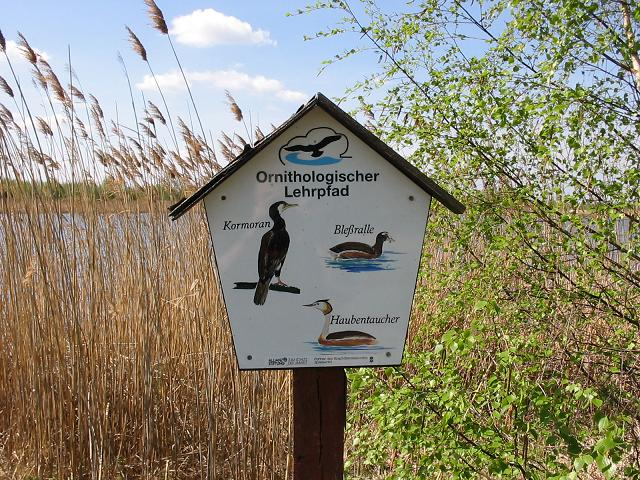 Spreewald_Ornithologischer_Lehrpad